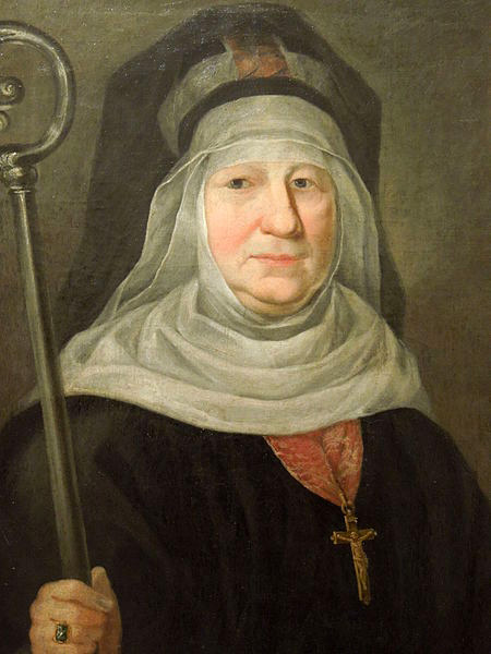 Malarz polski, połowa XIX wieku - Portret Makryny Mieczysławskiej